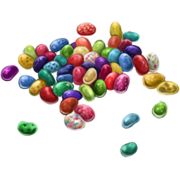 son los caramelos de harry potter